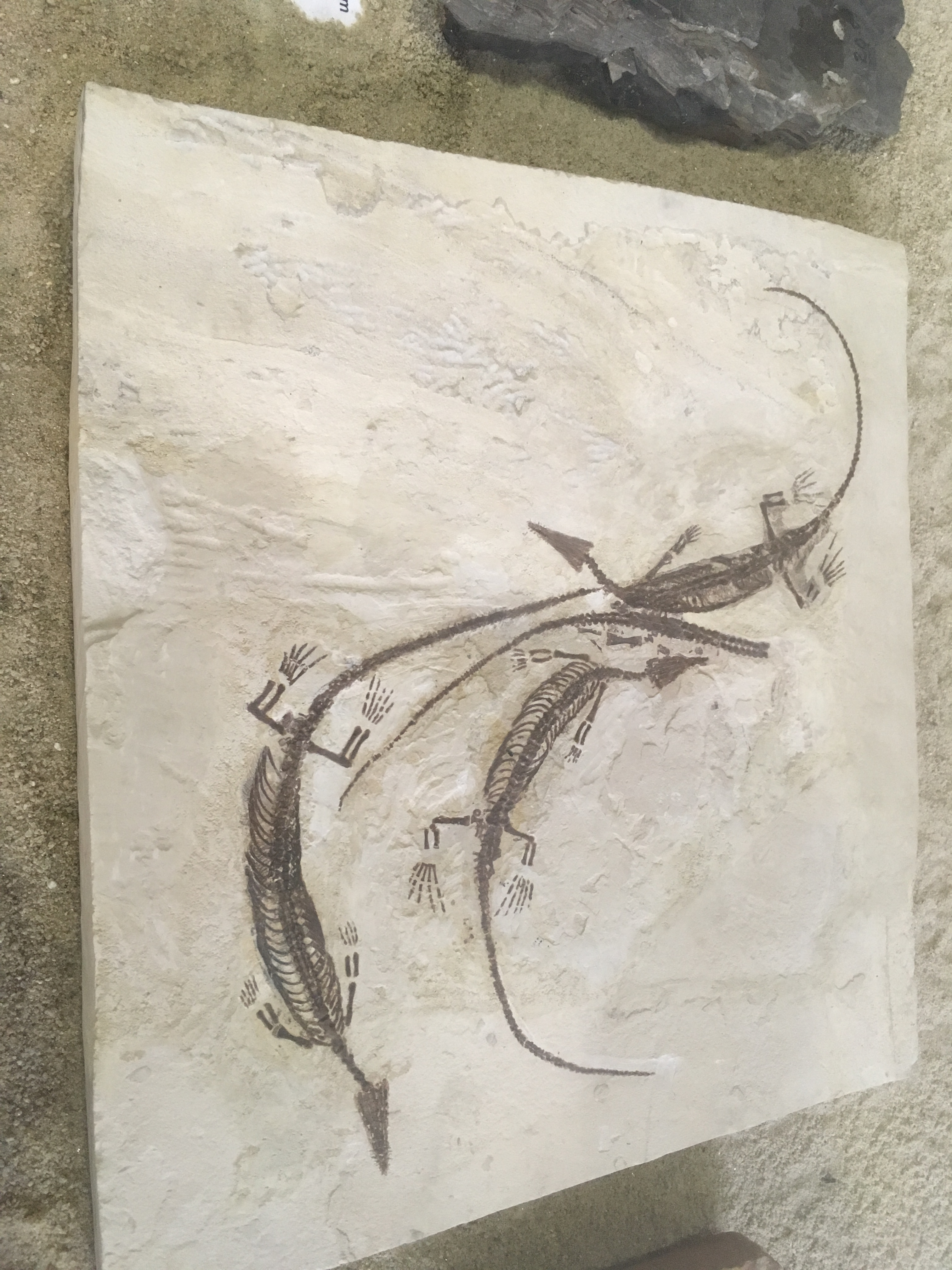 Fósseis de Mesossaurídeos jovens, Fm. Irati, Bacia do Paraná, Permiano - Exposição no Museu Geológico do Parque Água Branca, São Paulo - SP